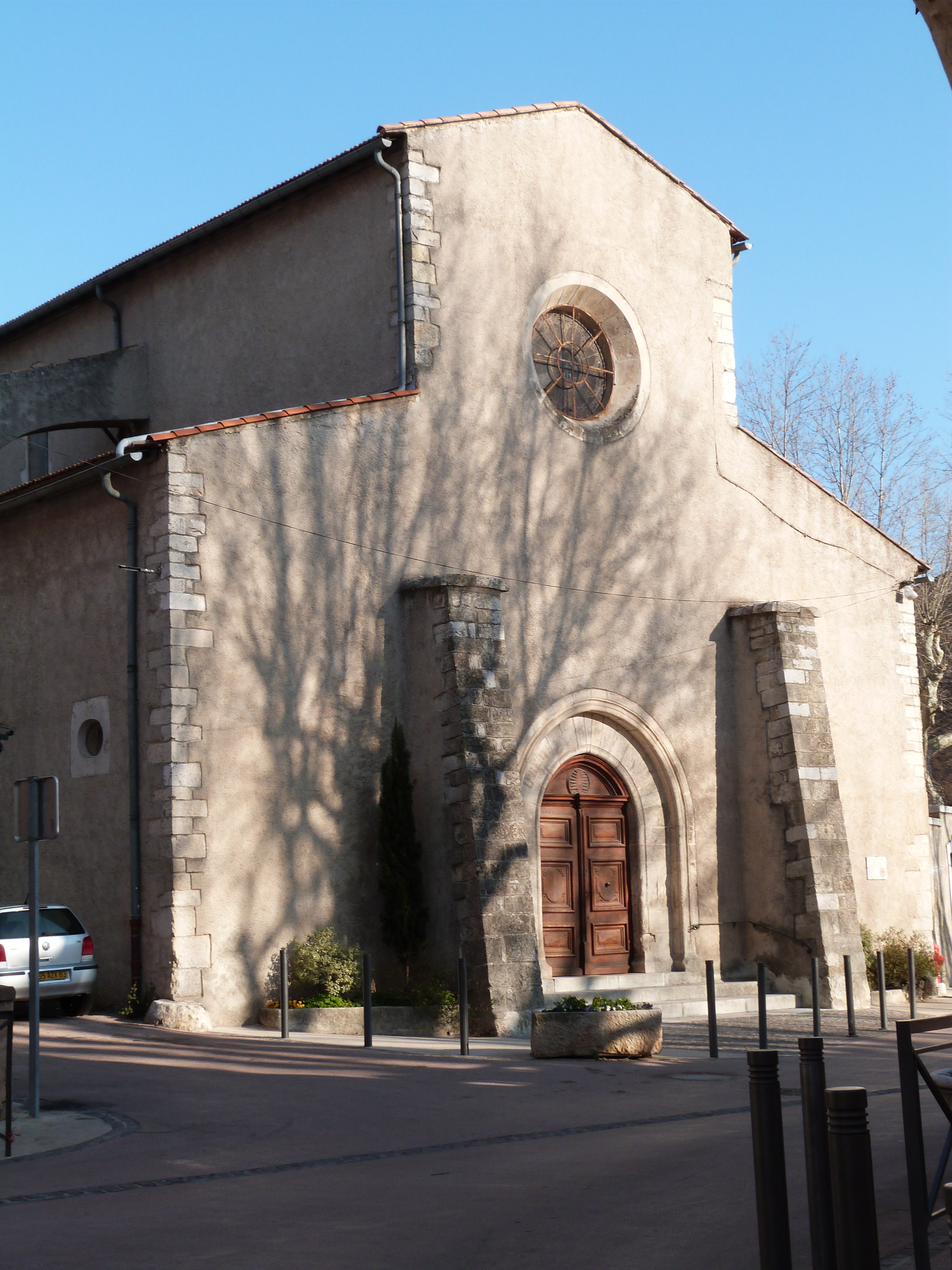 Façade de l'église paroissiale Saint-Sauveur à la Roquebrussanne (Var)